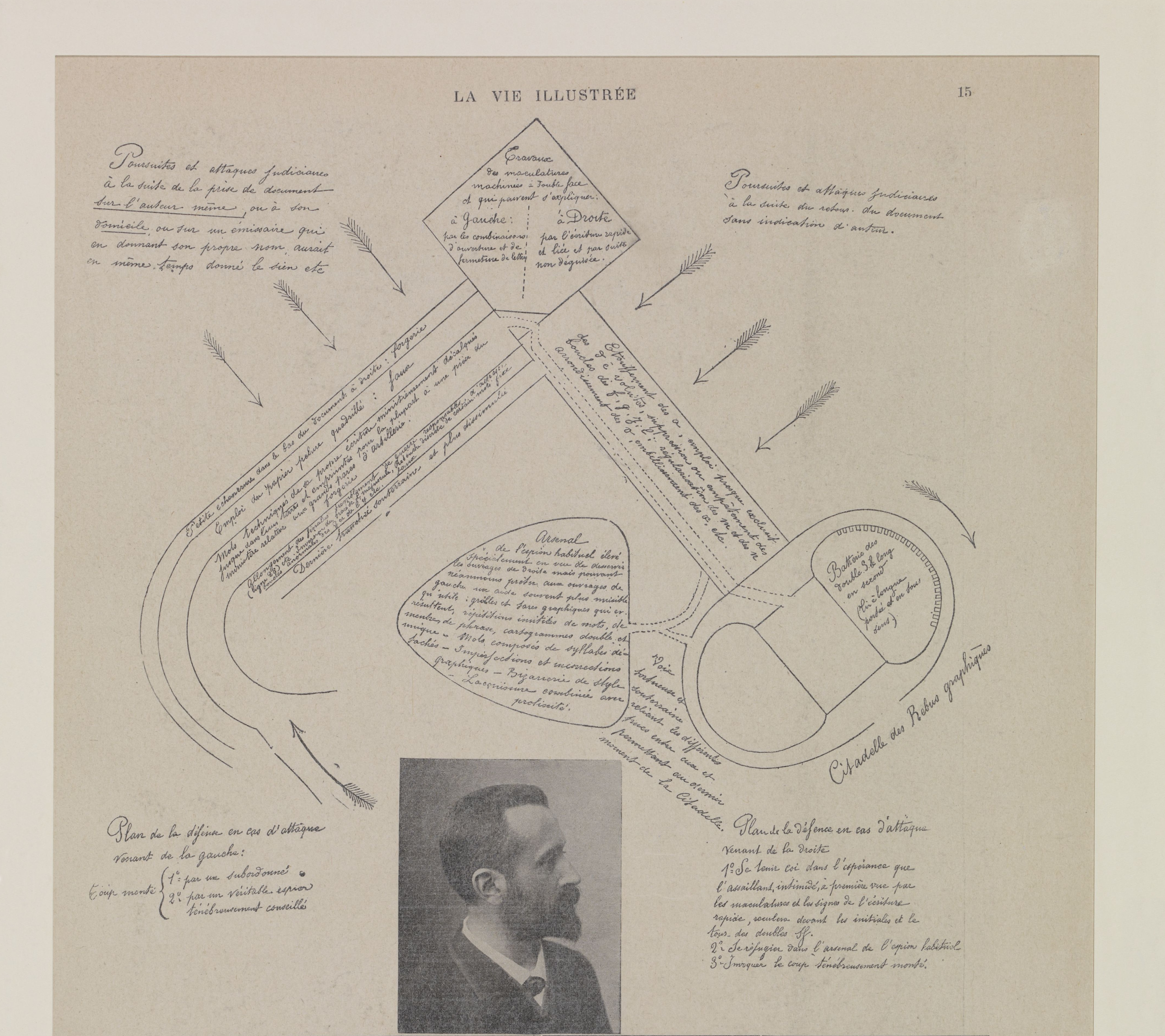 Reproduction du "Diagramme de Bertillon", dit aussi "le redant", ou "la forteresse", par lequel Bertillon, improvisé expert en écriture, tenta de convaincre les juges militaires de la culpabilité d' Alfred Dreyfus. C'est l'illustration de la théorie de l' "autoforgerie" selon laquelle Alfred Dreyfus a lui-même imité, avec des maladresses volontaires, sa propre écriture dans le "Bordereau" litigieux. Cette théorie vola en éclats, le sérieux et même la santé mentale d'Alphonse Bertillon furent mis en doute. Ce document, publié par "la Vie Illustrée", comporte un portrait de Bertillon.